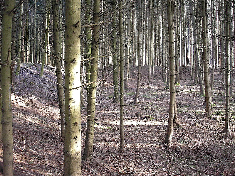 Frühmittelalterlicher Ringwall Walleshausen (Gemeinde Geltendorf, Landkreis Landsberg am Lech, Oberbayern). Der Innenraum des Hauptwerkes, Nordteil. Eigene Aufnahme, Feb. 2008 / Early Middle Ages ringwork castle Walleshausen near Geltendorf (Upper Bavaria, Germany). The courtyard of the central castle, northern part. Own photo, Feb. 2008